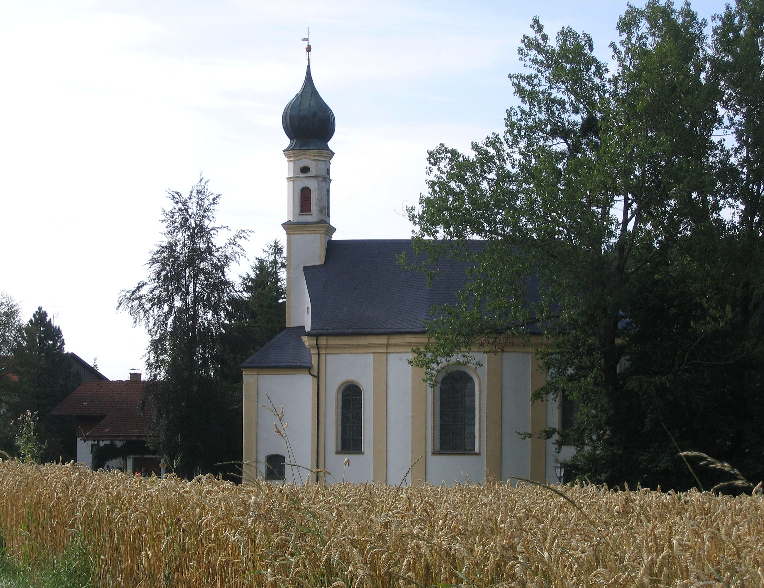 Kleinhelfendorf 28. Marterkapelle St. Emmeram, spätbarocker Zentralbau mit schlankem Chorturm mit Zwiebelhaube und östlich angefügter zweigeschossiger Sakristei, Putz- und Pilastergliederung, nach Plänen von Michael Pröbstl, 1740-52; mit Ausstattung.